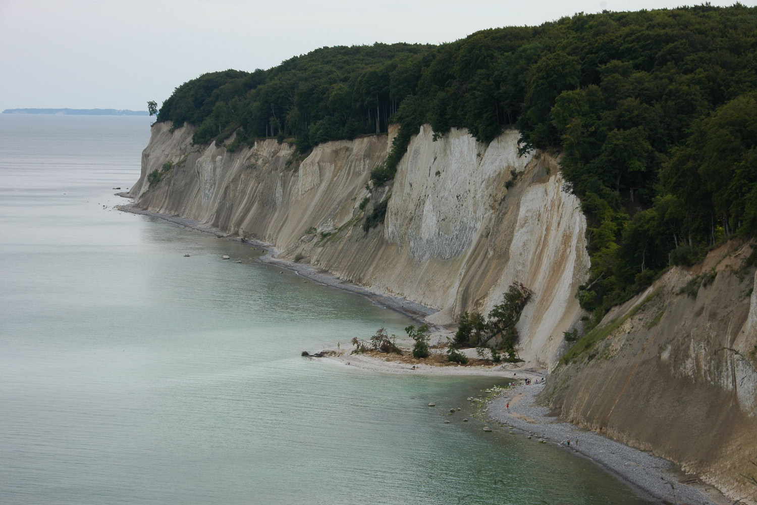 Großer Kreideabbruch auf Rügen. Der Abbruch ereignete sich in Nähe des “Kieler Baches”, in etwa der Mitte der rund 13 Kilometer langen Kreideküste zwischen Sassnitz und Lohme. Am 28.Juni 2007 wurde dieser Kreideabgang entdeckt.